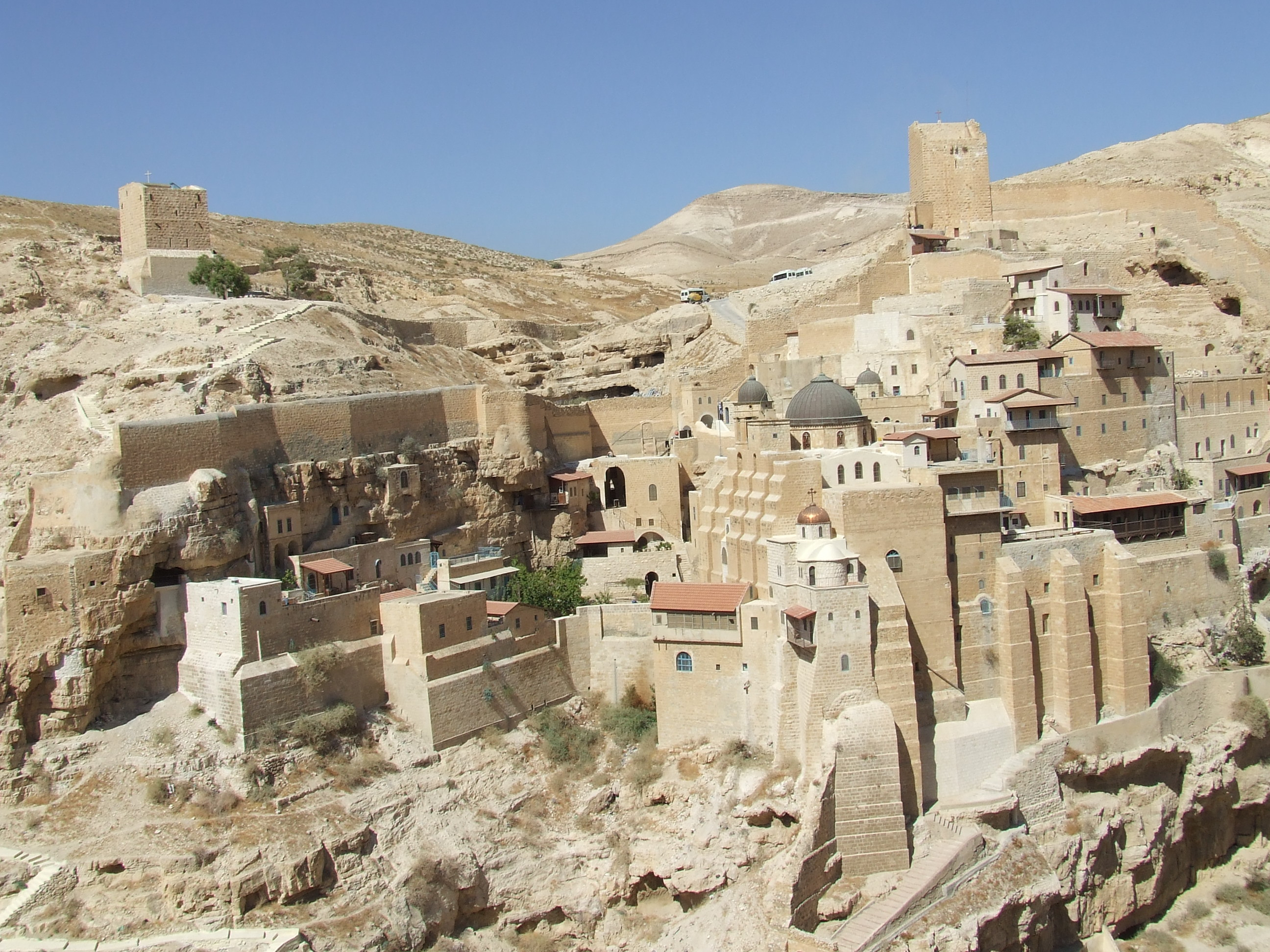 מנזר מר סבא